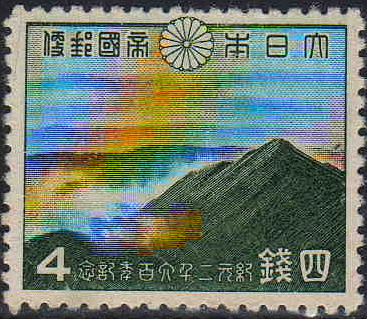 紀元2600年を記念して発行された4銭切手。描かれているのは高千穂の峰である